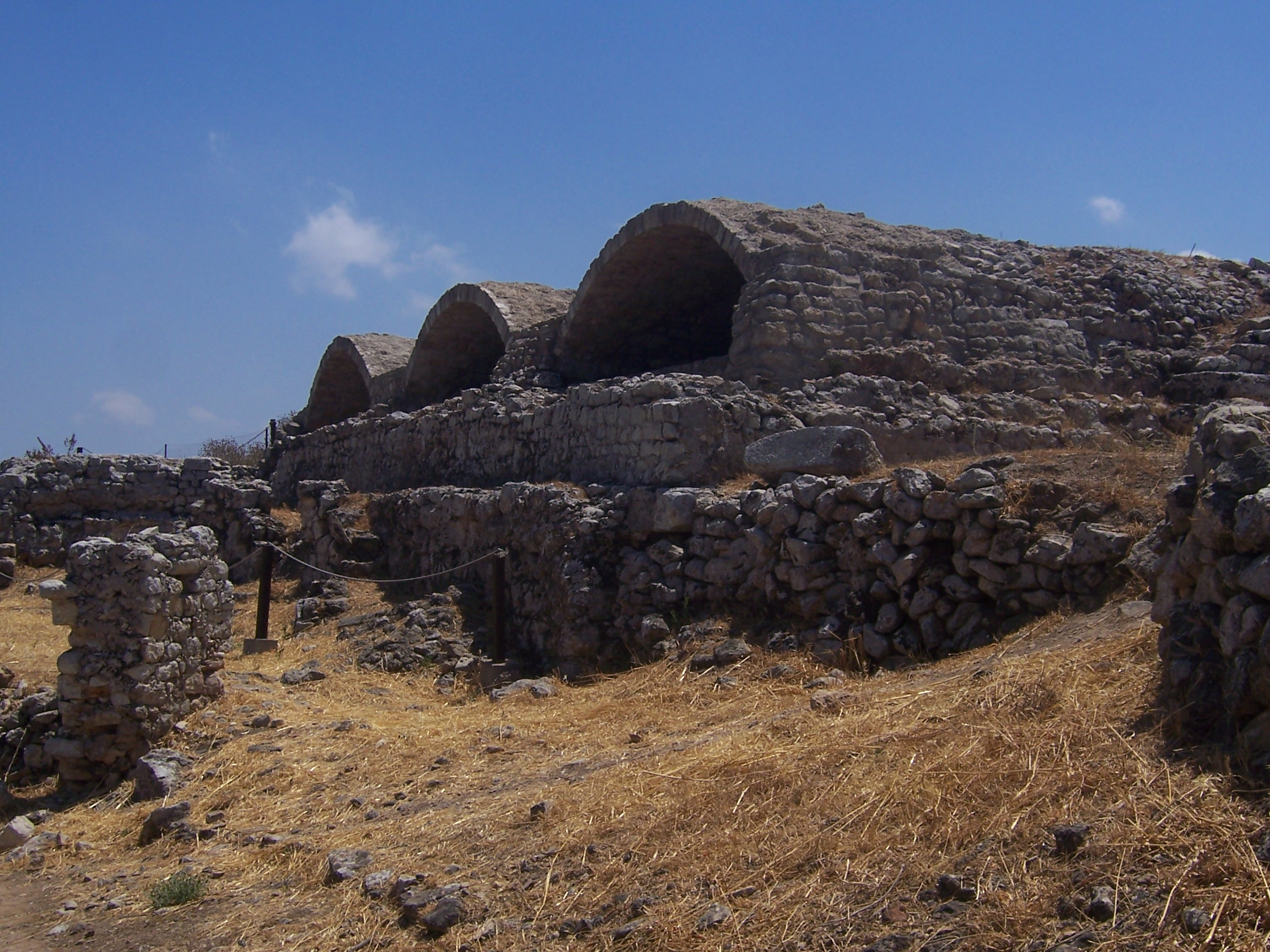 Citernes romaines. Aptera, Crète